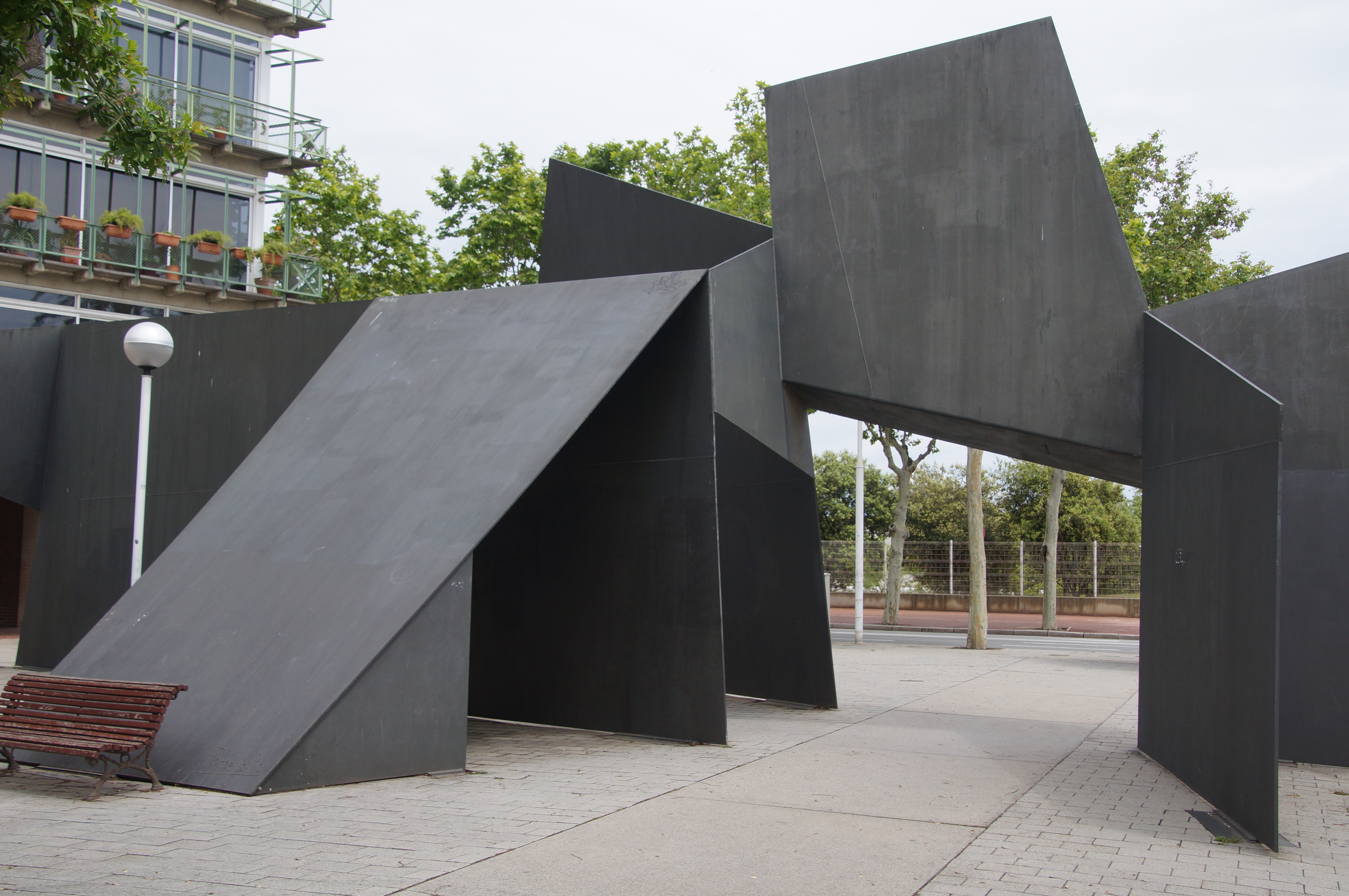 Raspall del vent (Francesc Fornells-Pla). C. Jaume Vicens i Vives, amb c. Salvador Espriu (Barcelona)